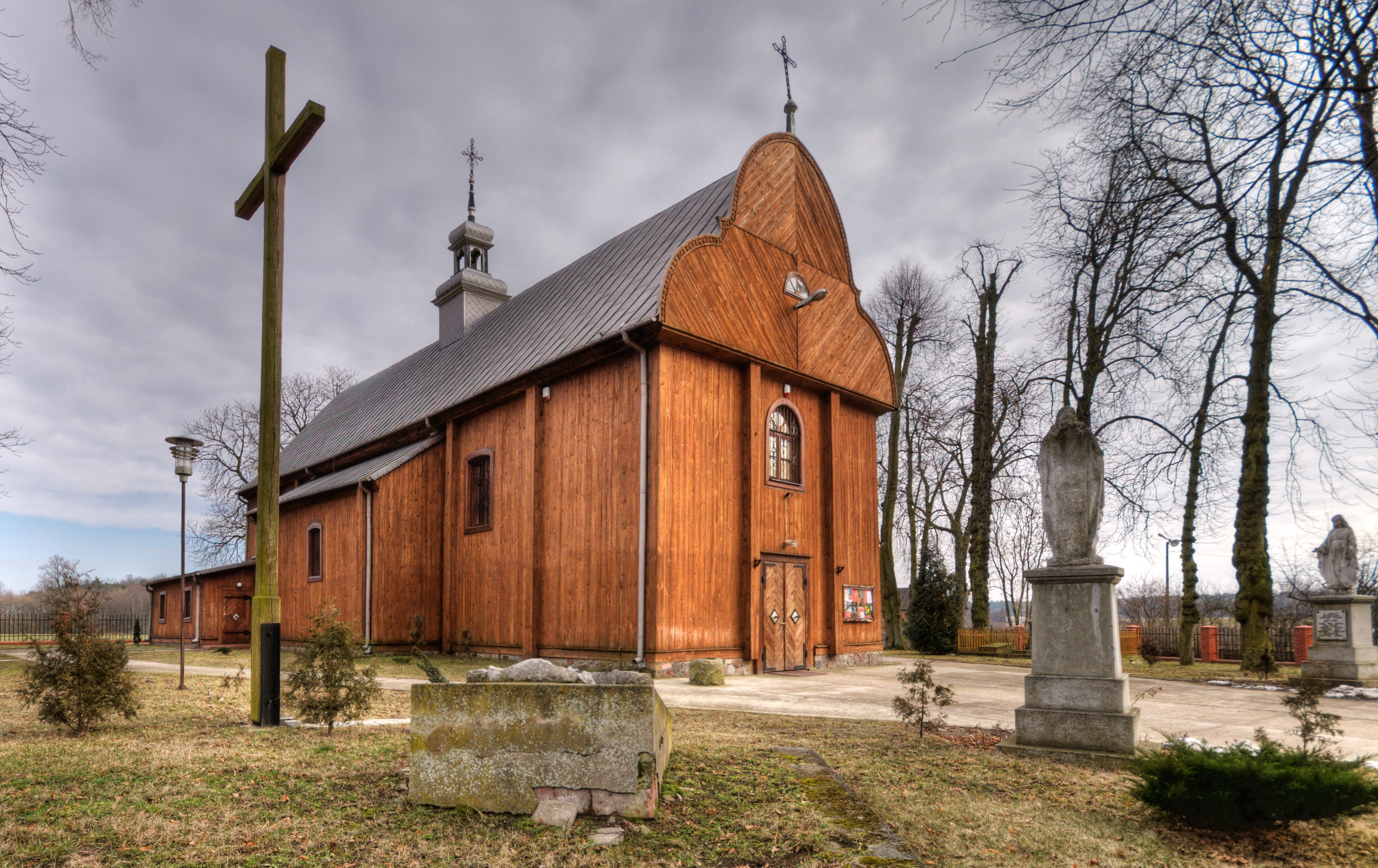 Sokołów w gminie Gostynin powiecie płockim